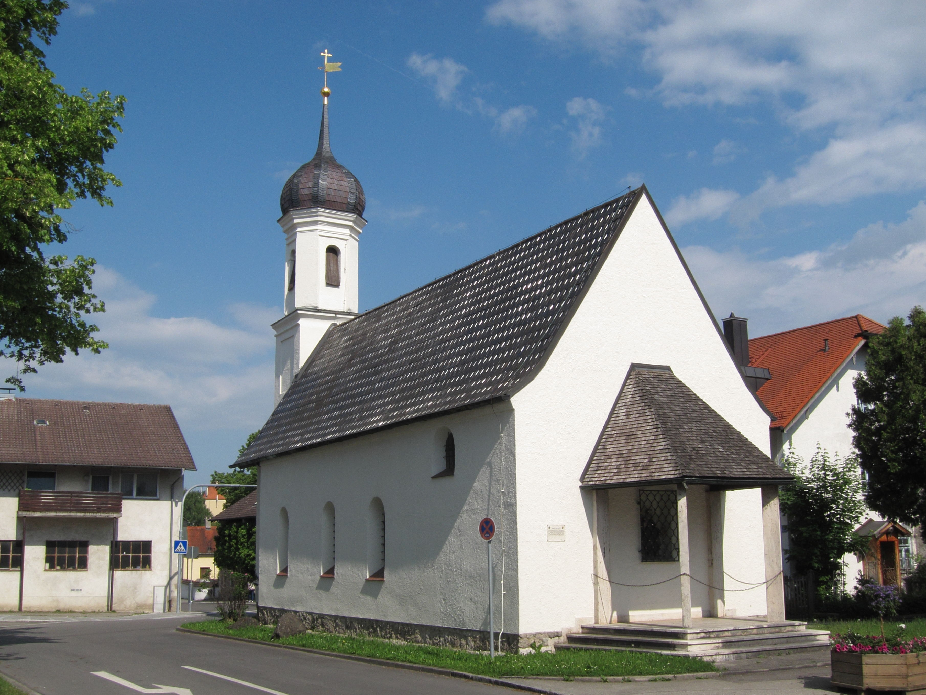 Leonhardstraße 1; Katholische Kirche St Leonhard, im Kern spätgotisch, 2. Hälfte 13. Jahrhundert, barocke Umgestaltung 17. und 18. Jahrhundert, Turm 1720; mit Ausstattung.